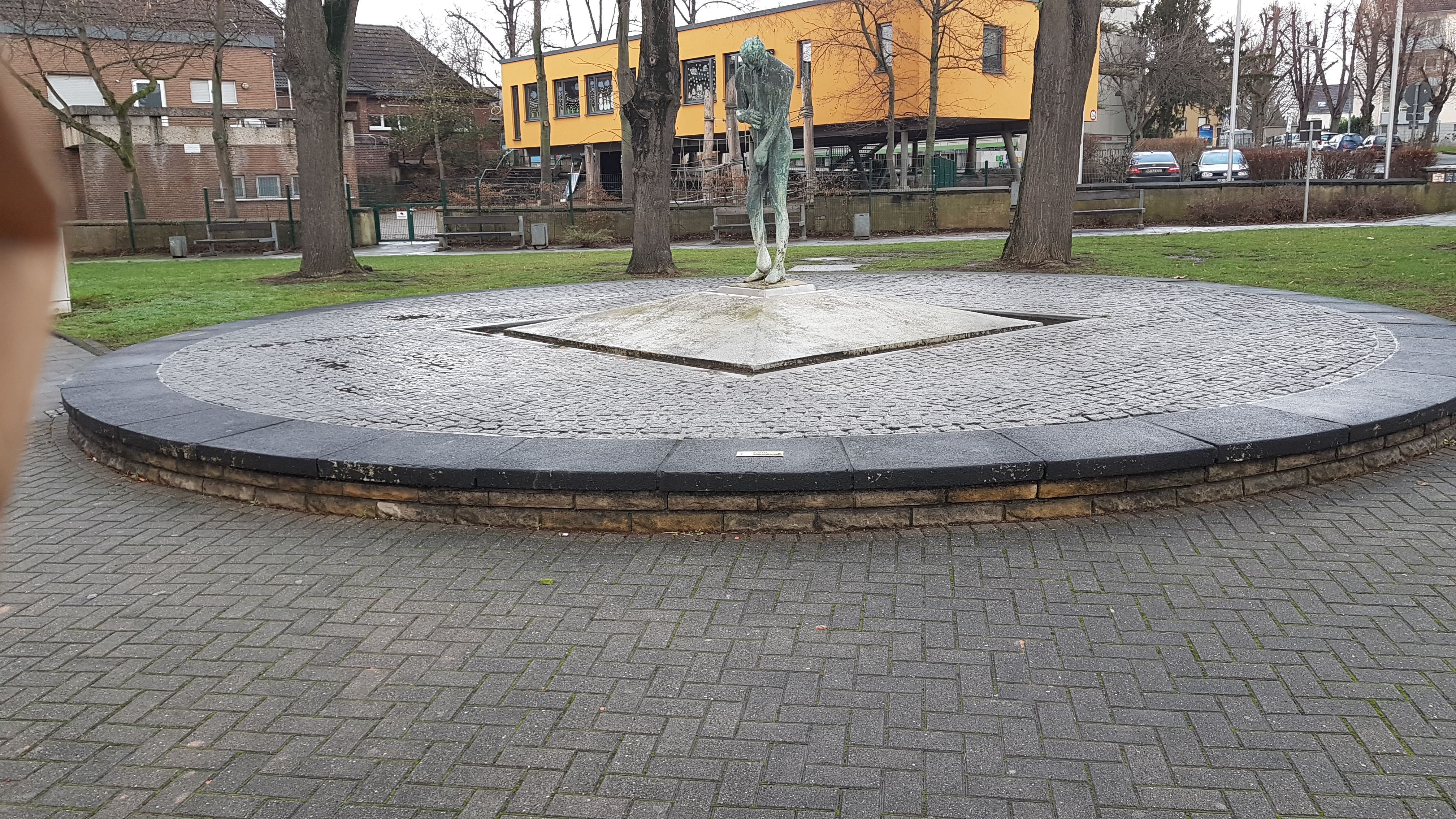 Glasbläserbrunnen in Bergheim Quadrath-Ichendorf nach dem letzten Umbau.